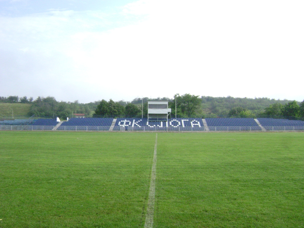 Српски (ћирилица): Стадион ФК Слога, Краљево, Србија.